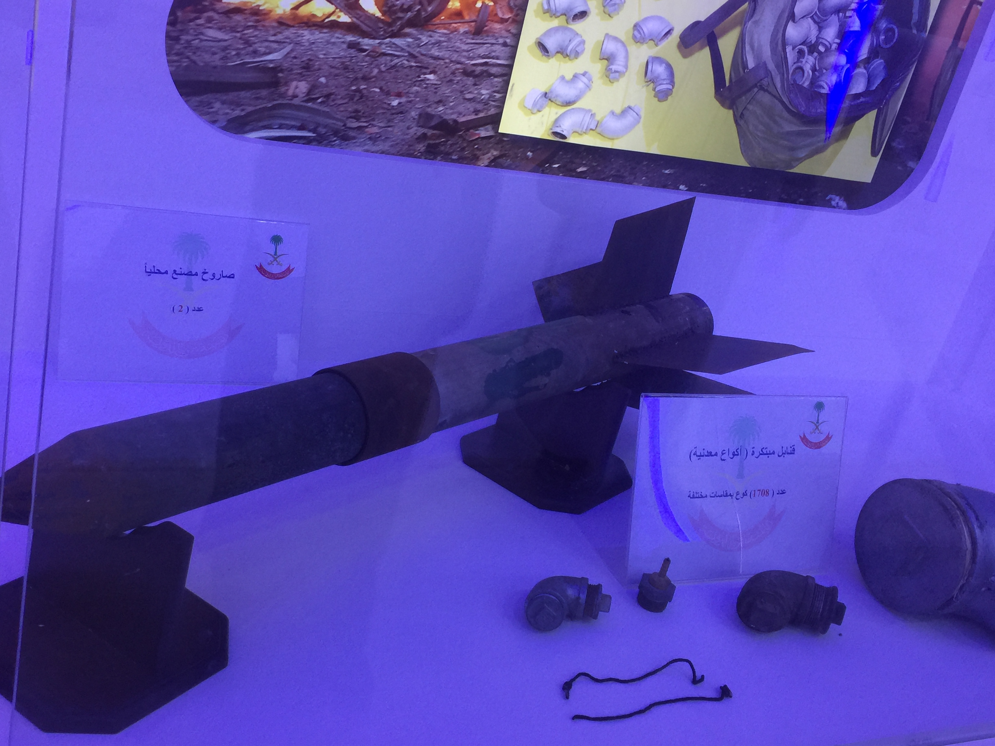 صاروخ وأحزمة ناسفة ومتفجرات تابعة لخلايا إرهابية تم حجزها من قبل رئاسة أمن الدولة.